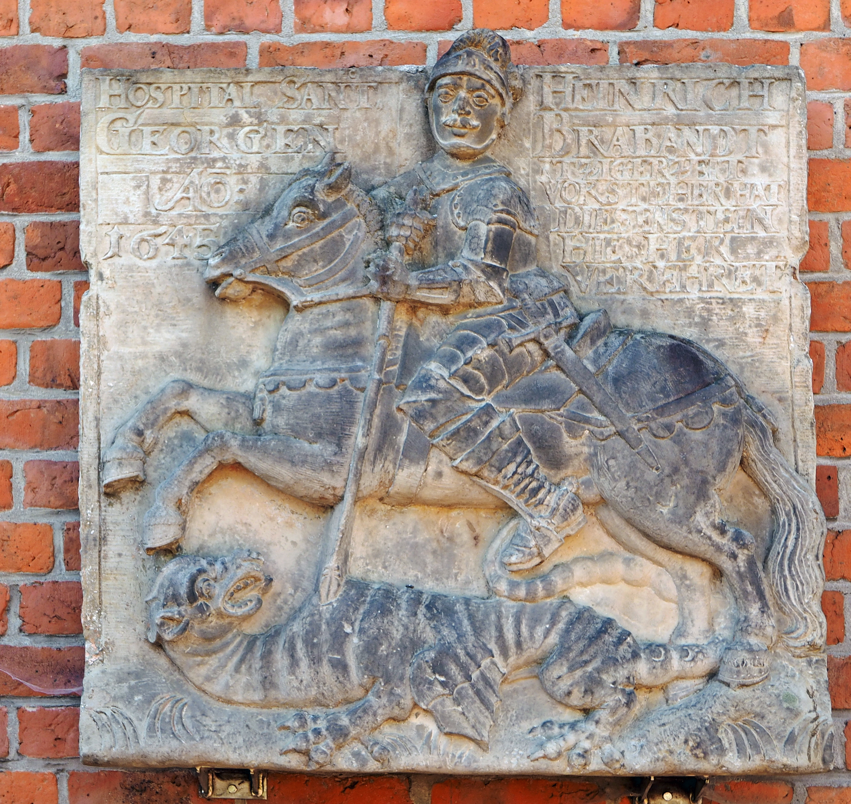 Sandstein-Relief an der St. Georg-Kirche, Blumlage, Celle (ehemals am St. Georg-Hospital)